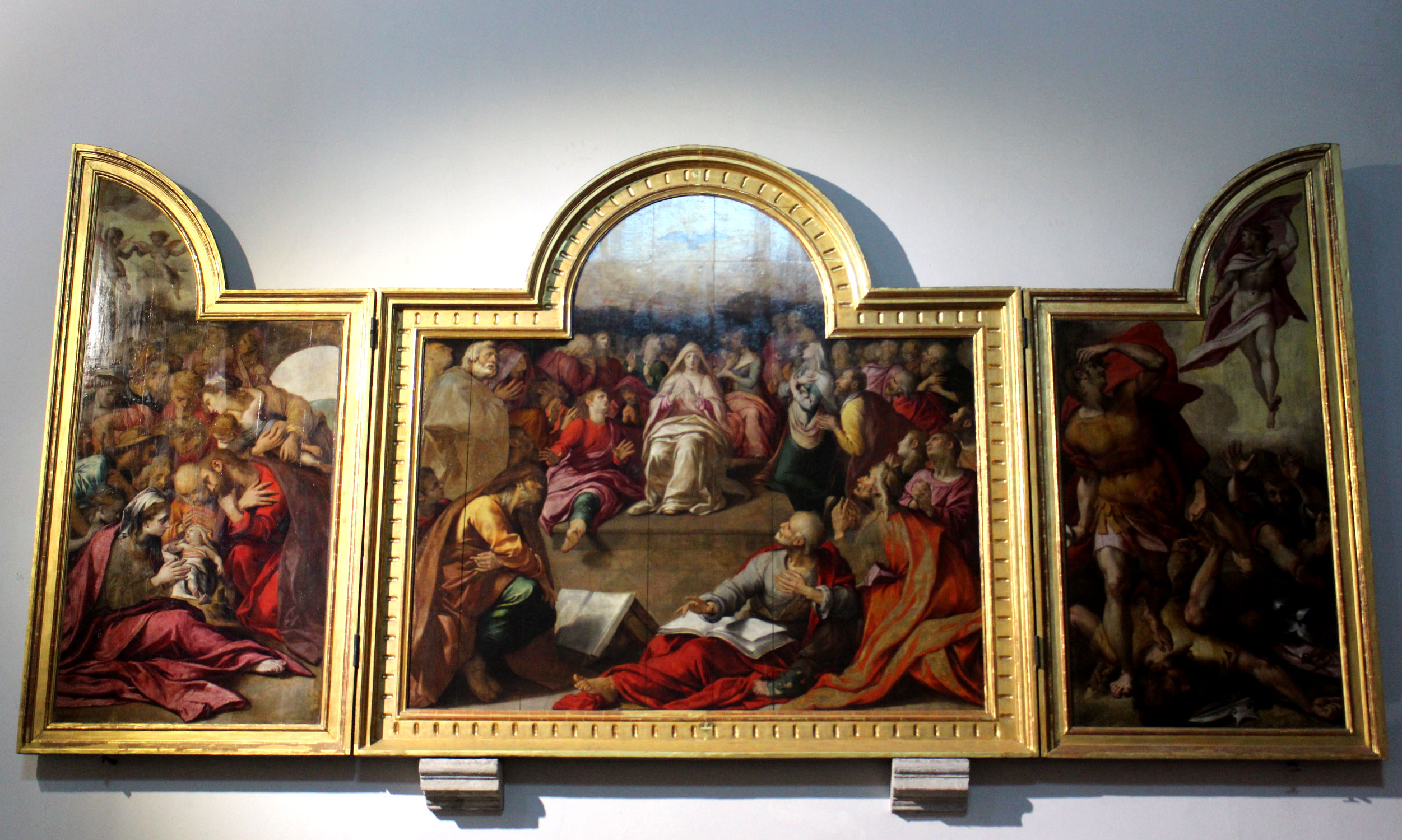 Zarauzko Frantziskanoen elizako koadro bat. Bibliako pasarte batean oinarritua.